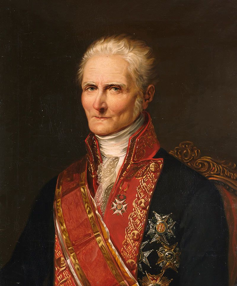 Retrato de Joaquín de la Pezuela (1761-1830), marqués de Viluma